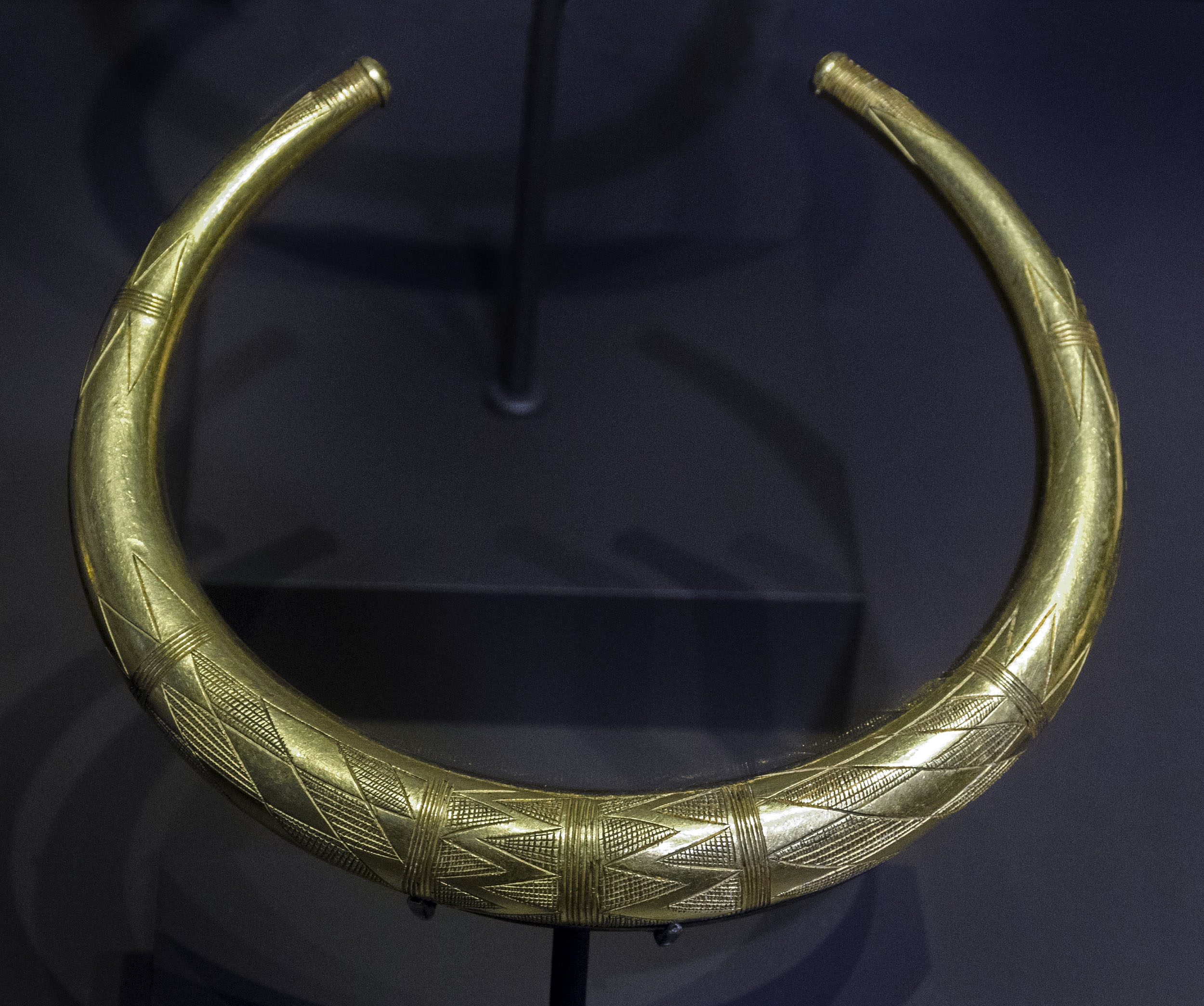 Torque de oro macizo de unos 15 cm de diámetro perteneciente al "tesoro de Berzocana" (partido judicial de Logrosán, Cáceres). Apareció en 1961 dentro de una pátera de bronce junto a otras dos piezas parecidas de las cuales una se ha perdido. Se ha datado en el periodo 1000-800 a.C.